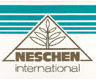 Logo Neschen GmbH (1989)